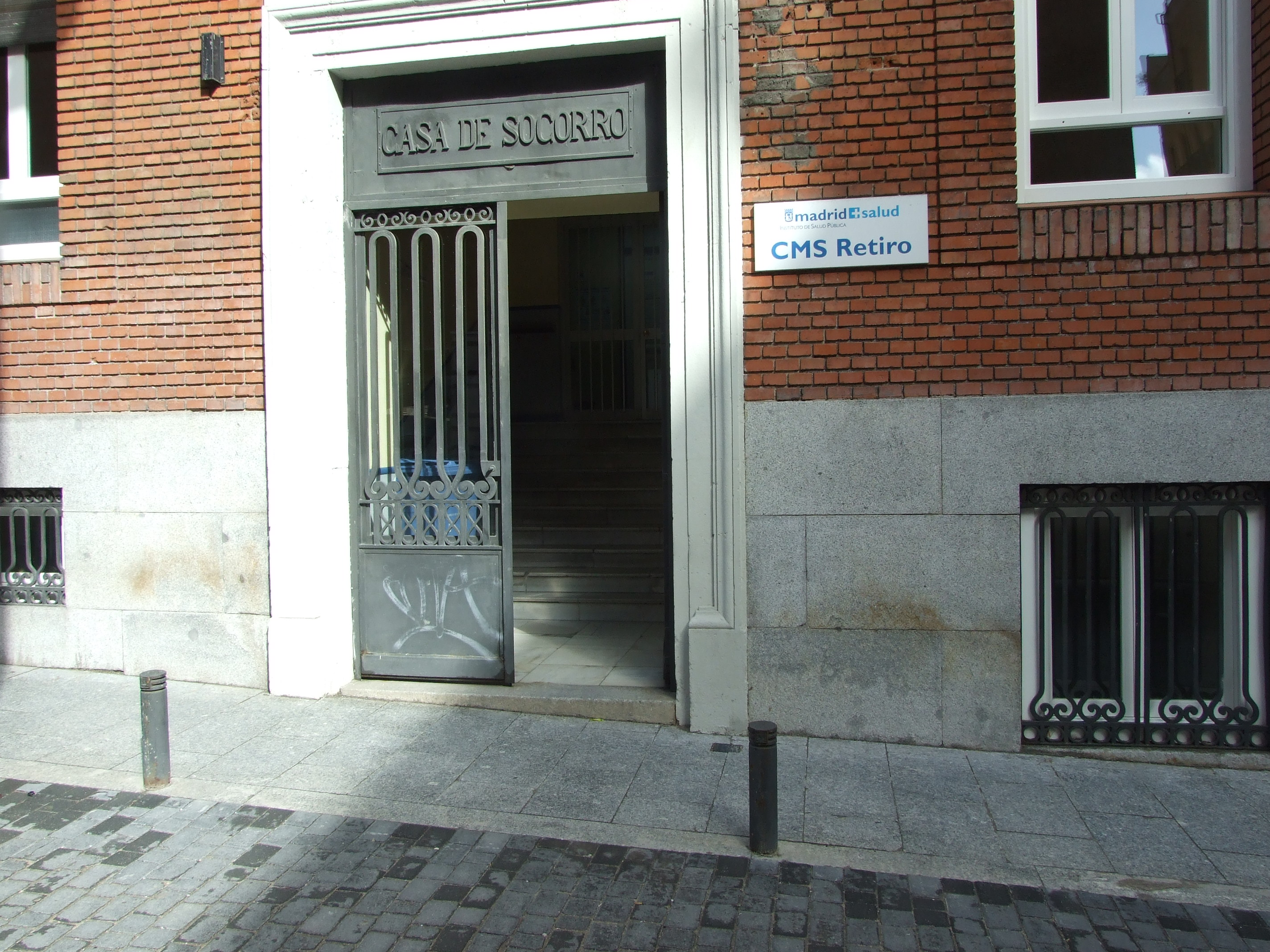 El actual CMS de Retiro conserva la histórica identificación de Casa de Socorro